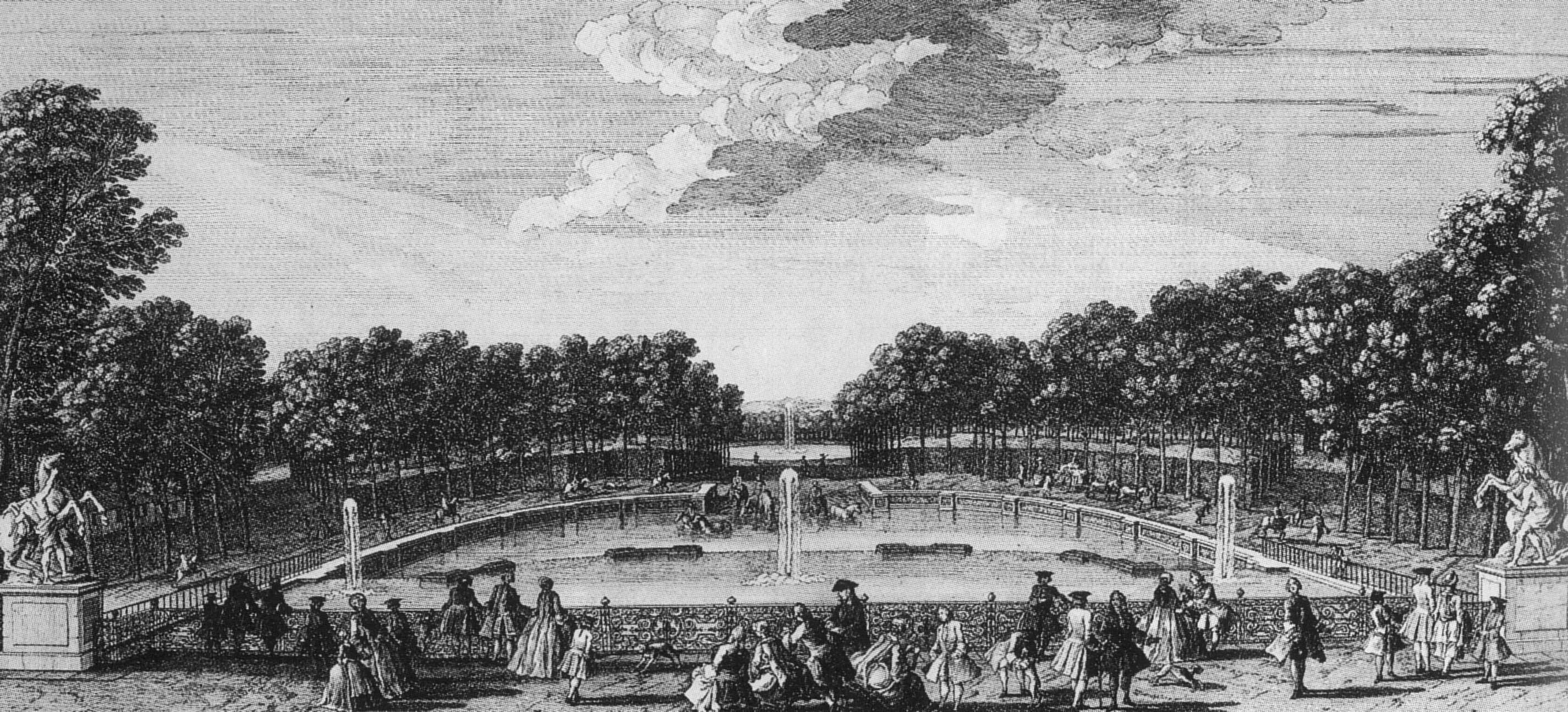 Pferdeschwemme des Schlosses Marly